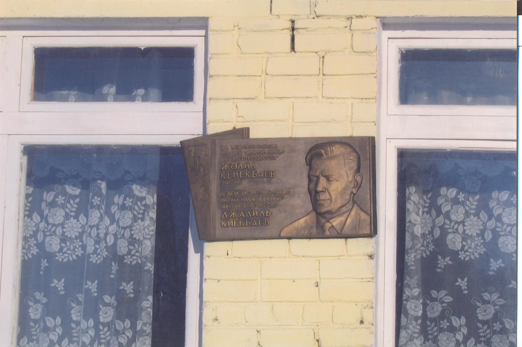 Мемориальная доска на стене Саитбабинкой школы Гуфурийского района, Башкортостан